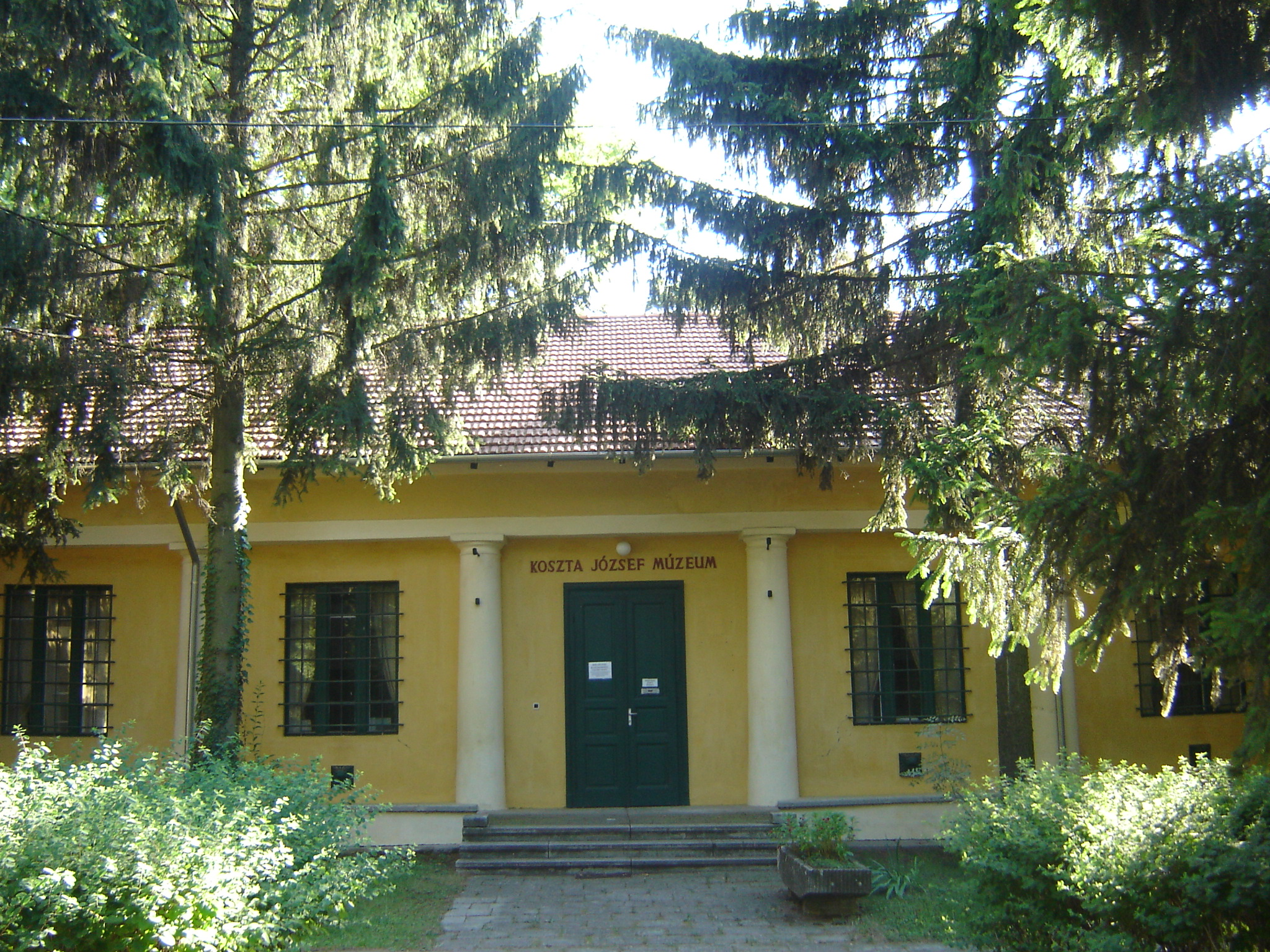 Koszta József múzeum, volt Károlyi-kastély, késő klasszicista, 1840 körül. 3546 volt Koszta József Múzeum Főbejárat Ebben az épületben működött a Koszta József Múzeum több évtizeden keresztül, 2006 óta már beköltözött a szentesi volt megyháza épületébe, amelyet 2005-ben felújítottak. U alaprajzú, klasszicizáló stílusú múzeumépület, mely 1870-ben vendéglőnek épült, de három évvel később eredeti funkciója már meg is szűnt. 1913-ban az épület egészét birtokba vették a múzeumi gyűjtemények. Jelenleg: Csallány Gábor Kiállítóhely - Szentes, Széchenyi liget 1.